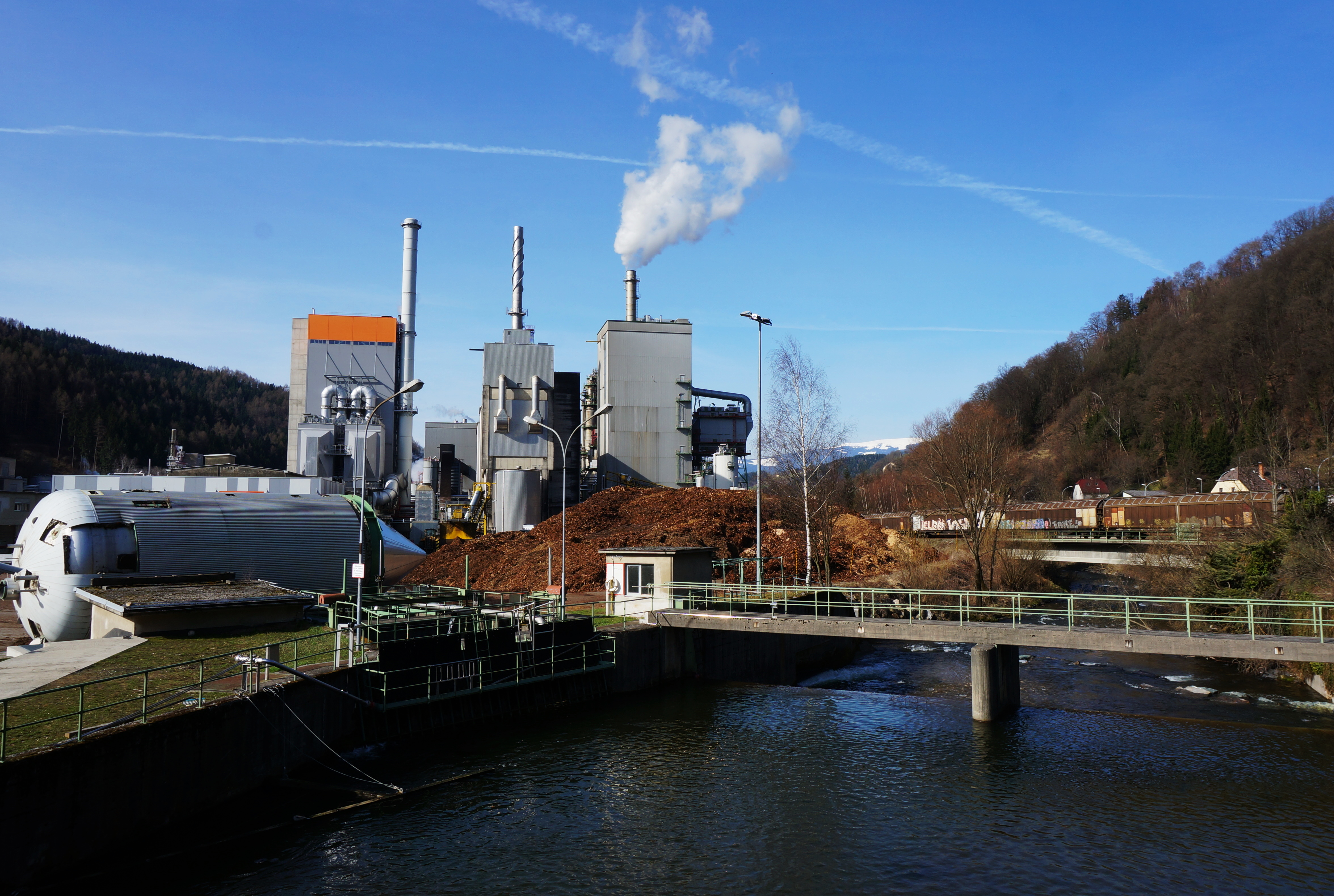 Mondi Zellstoff- und Papierfabrik in der Gemeinde Frantschach-Sankt Gertraud, Bezirk Wolfsberg, Kärnten, Österreich, EU